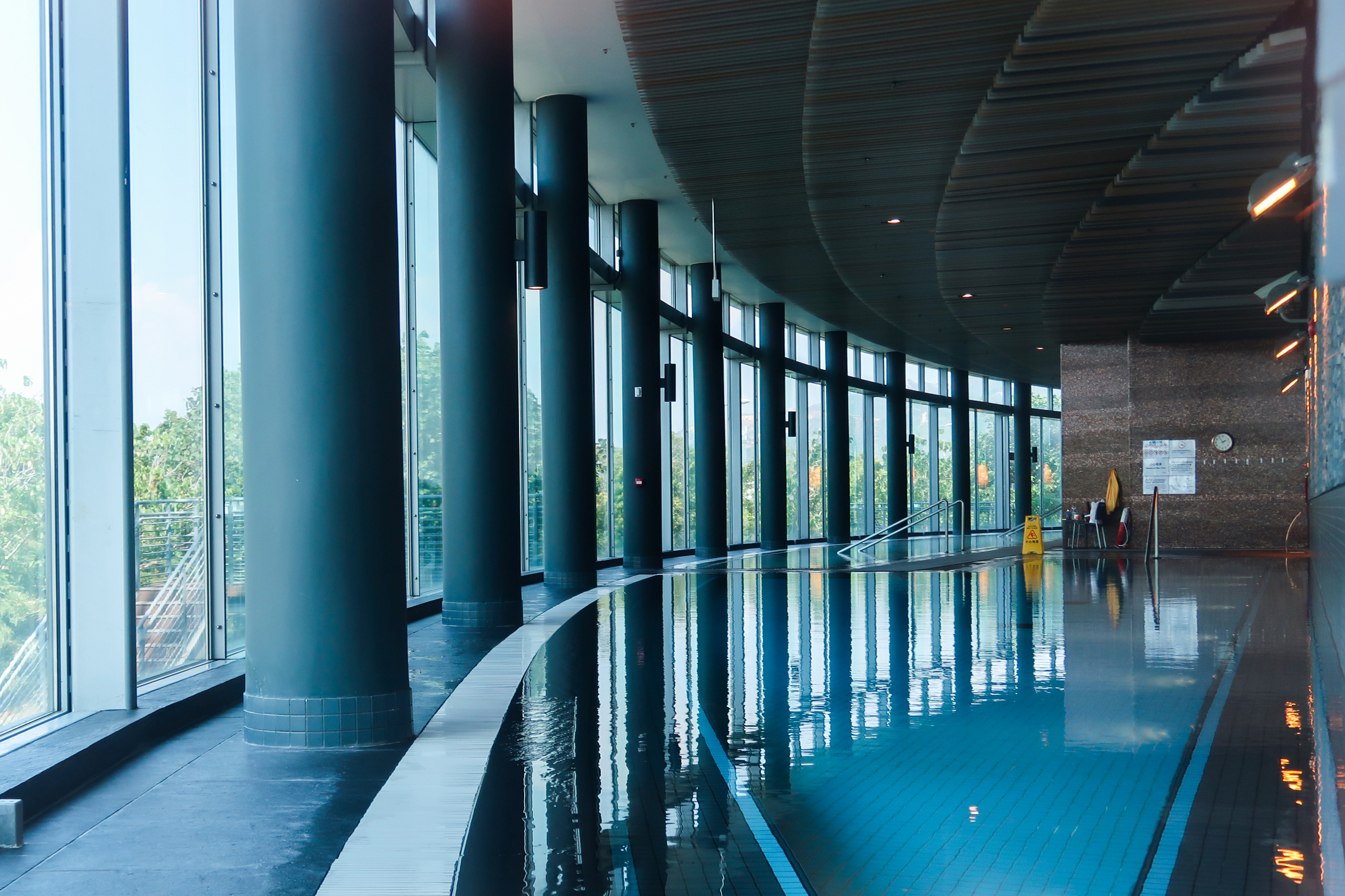 T Park T SPA